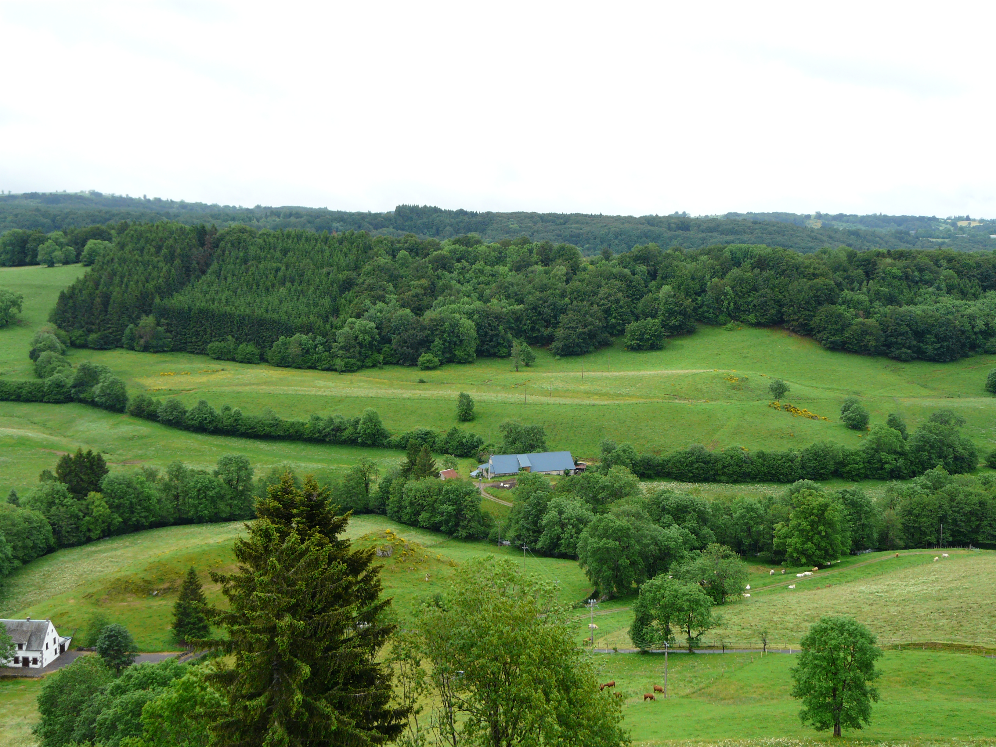 La vallée de la Burande vue depuis le belvédère de La Tour-d'Auvergne, Puy-de-Dôme, France. La Burande est marquée par la ligne d'arbres qui serpente entre les deux bâtiments.